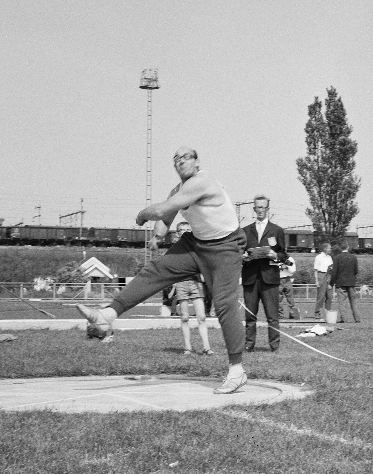 Internationale atletiekwedstrijden, Cees Koch (discuswerpen) in actie